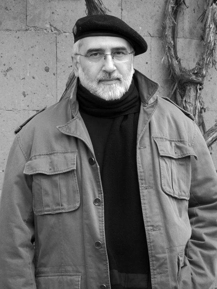 Վահան Արծրունի